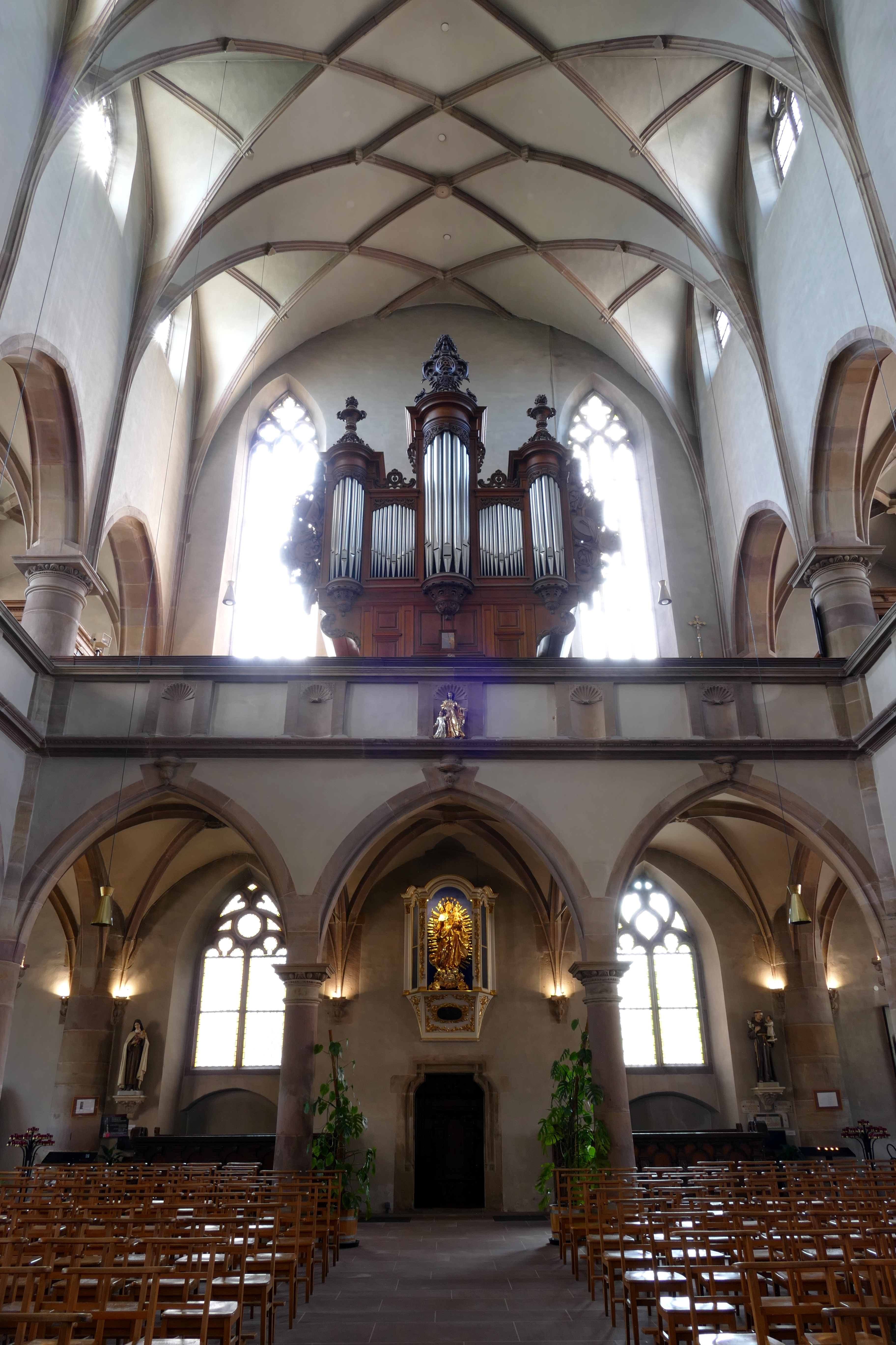 Alsace, Bas-Rhin, Église Saint-Georges de Molsheim, ancienne église des Jésuites (1618) (PA00084798, IA67006097).Orgue de Jean-André Silbermann (1781): This object is classé Monument Historique in the base Palissy, database of the French furniture patrimony of the French ministry of culture, under the references PM67001055 and IM67009693. This object is classé Monument Historique in the base Palissy, database of the French furniture patrimony of the French ministry of culture, under the references buffet PM67000181 buffet and instrument PM67001056 instrument.